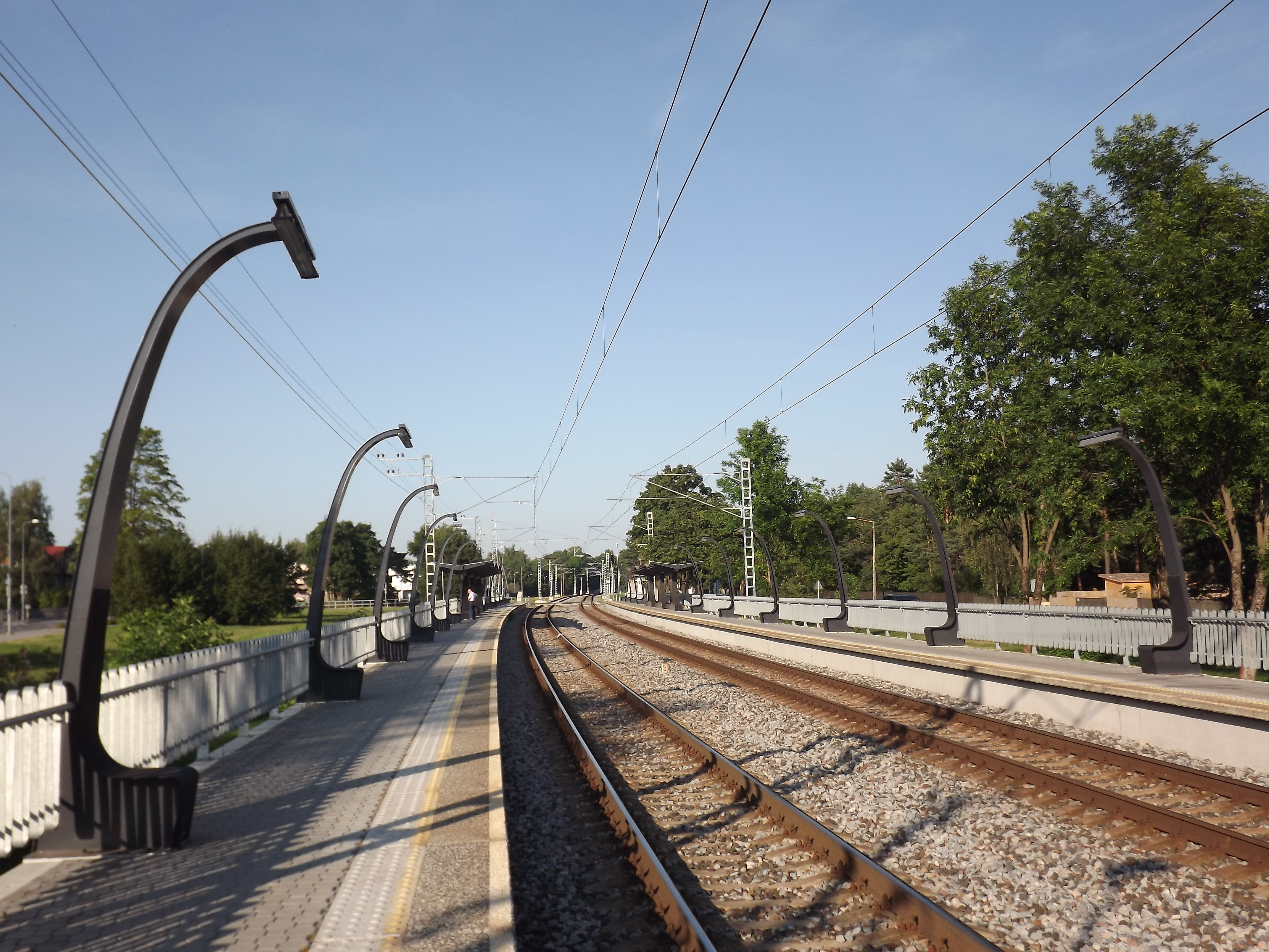 Hiiu raudteepeatus.